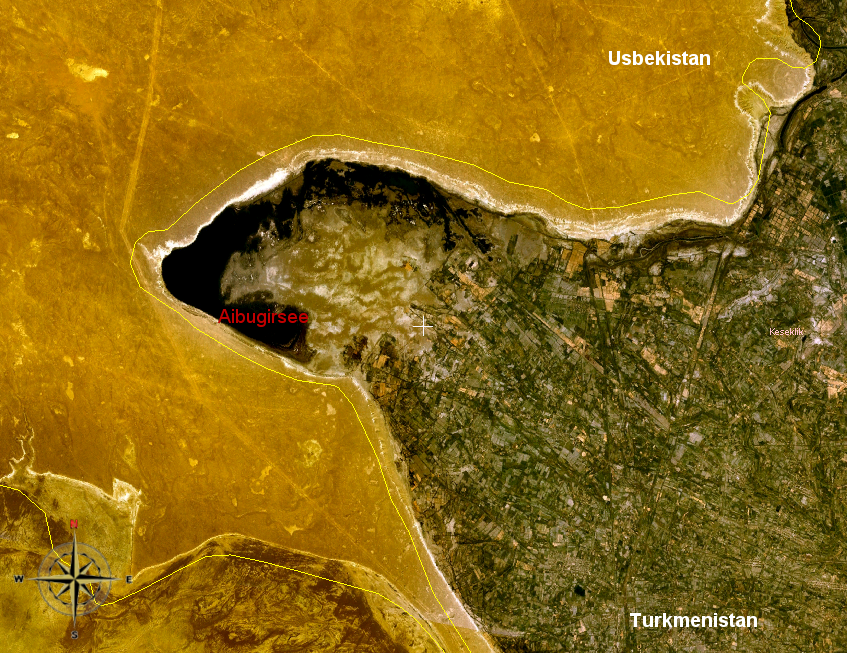 Satellitenaufnahme des Aibugirsees Sonstiges: Eigenhändig nachbearbeitet (Landesnamen eingefügt)